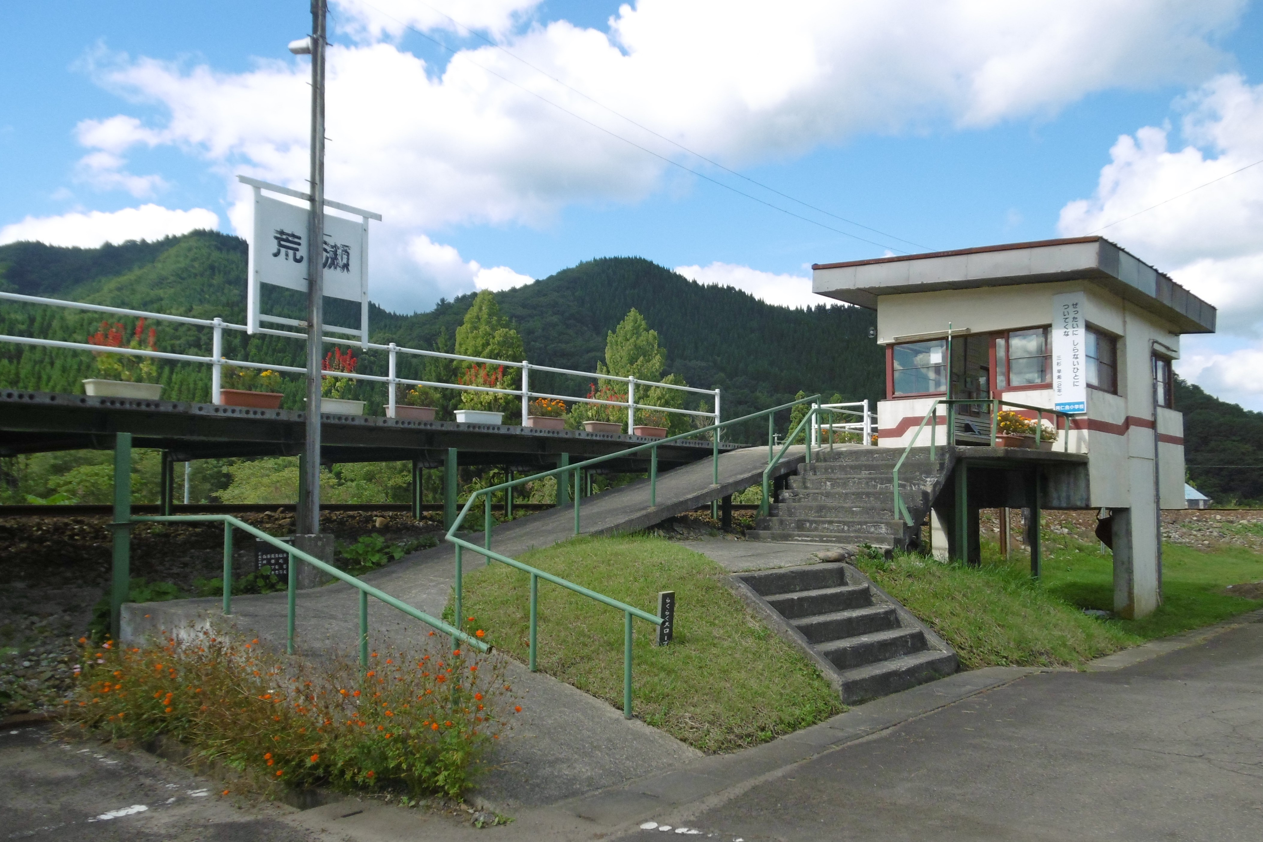 秋田内陸線・荒瀬駅